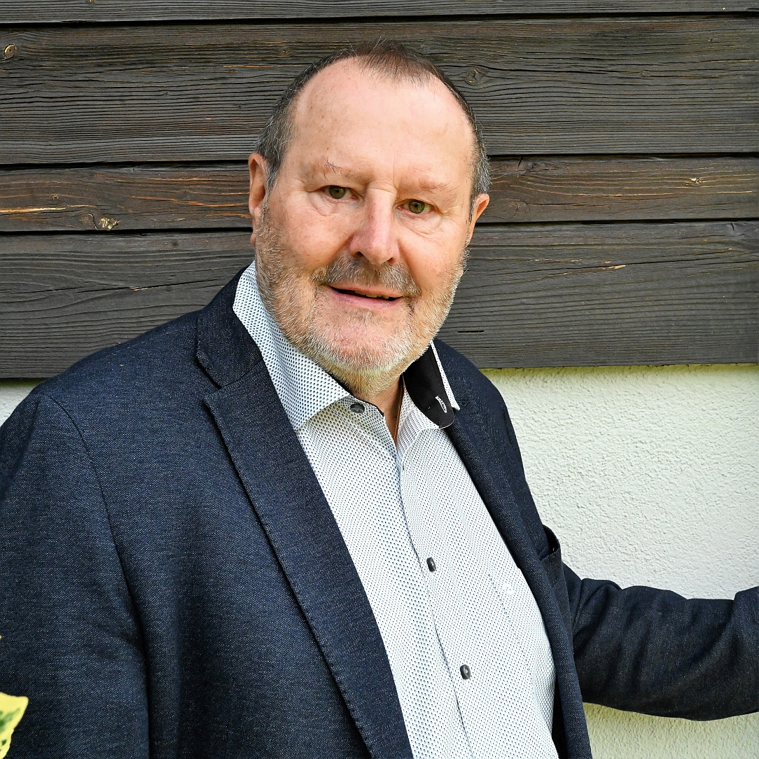 Bild von mir, Romano Cuonz, aufgenommen am 18.7.2019 durch Zeitauslöser in Sarnen für die Veröffentlichung im Wikipedia